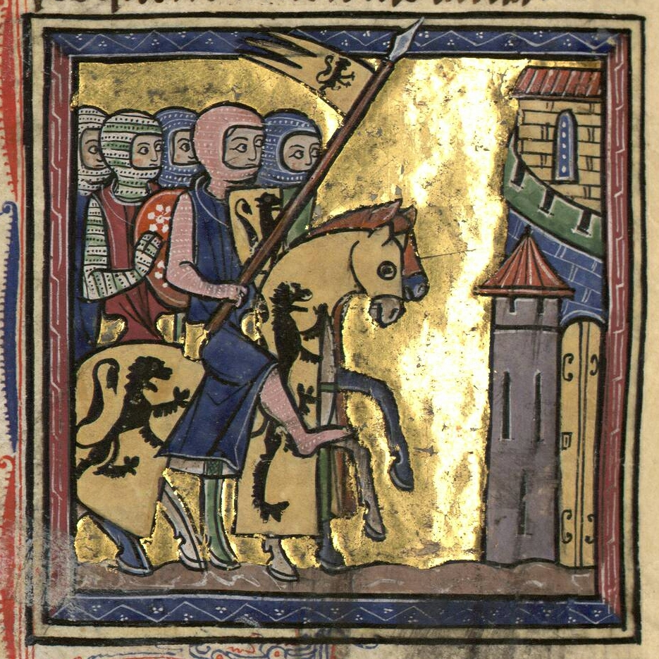 Bohémond III et Raymond III à Jérusalem